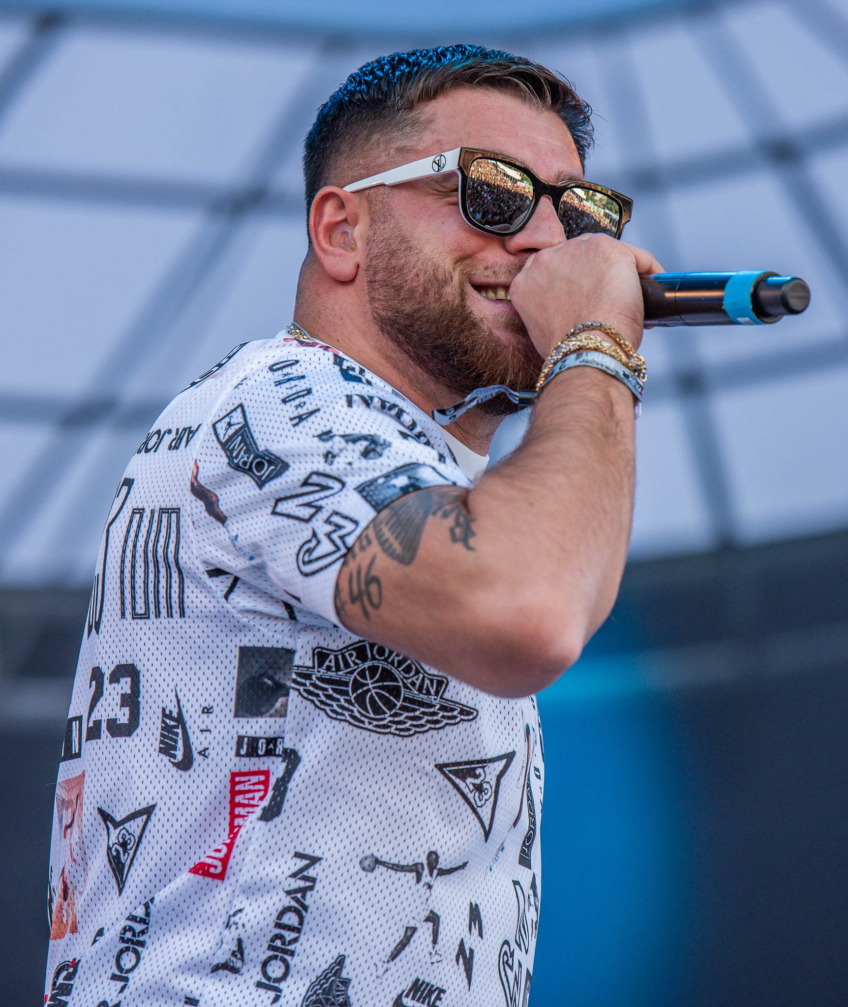 ARGO-Konzerte,Beck's Park Stage,Hüseyin Kökseçen,KC Rebell,Konzert,Livekonzert,Livemusik,Musik,RiP,Rock im Park 2019